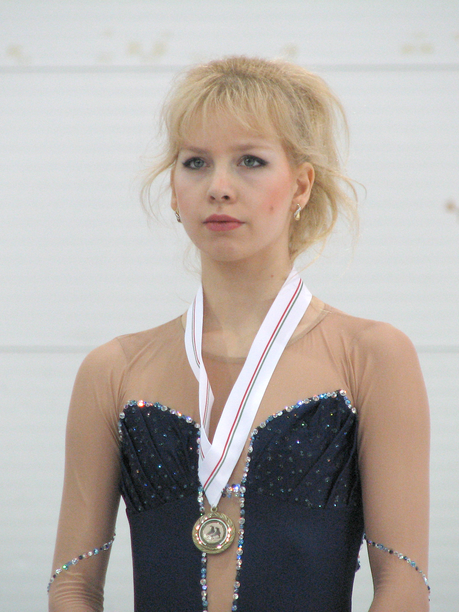 Viktória Pavuk, Hungarian figure skater at the 2007-2008 Hungarian National Championship